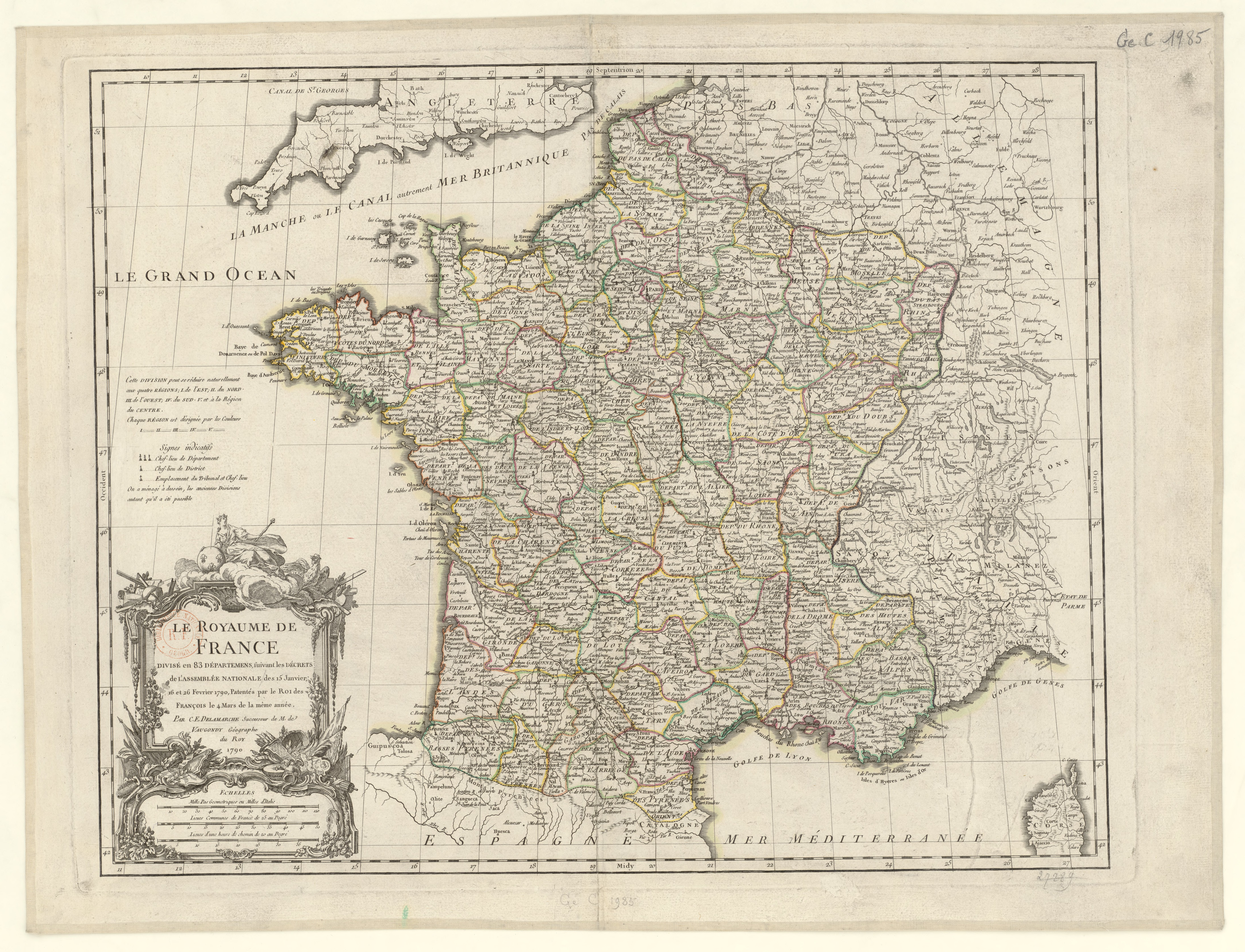 France)